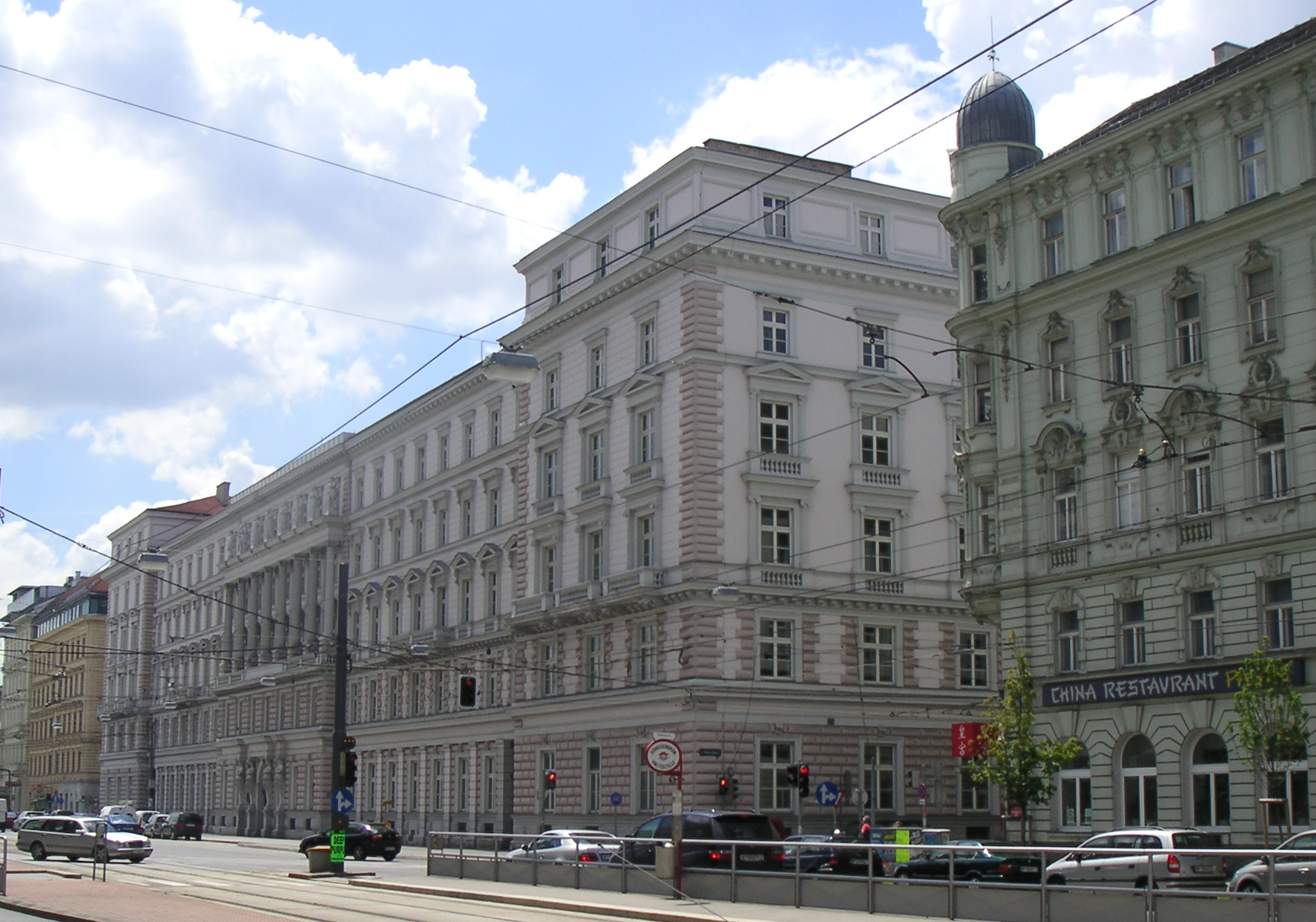 das Haus Nordbahnstraße 50 in der Leopoldstadt, in Wien